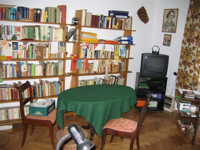 Lucjan Wolanowski's house (23, Odolańska Str., Warsaw, Poland)